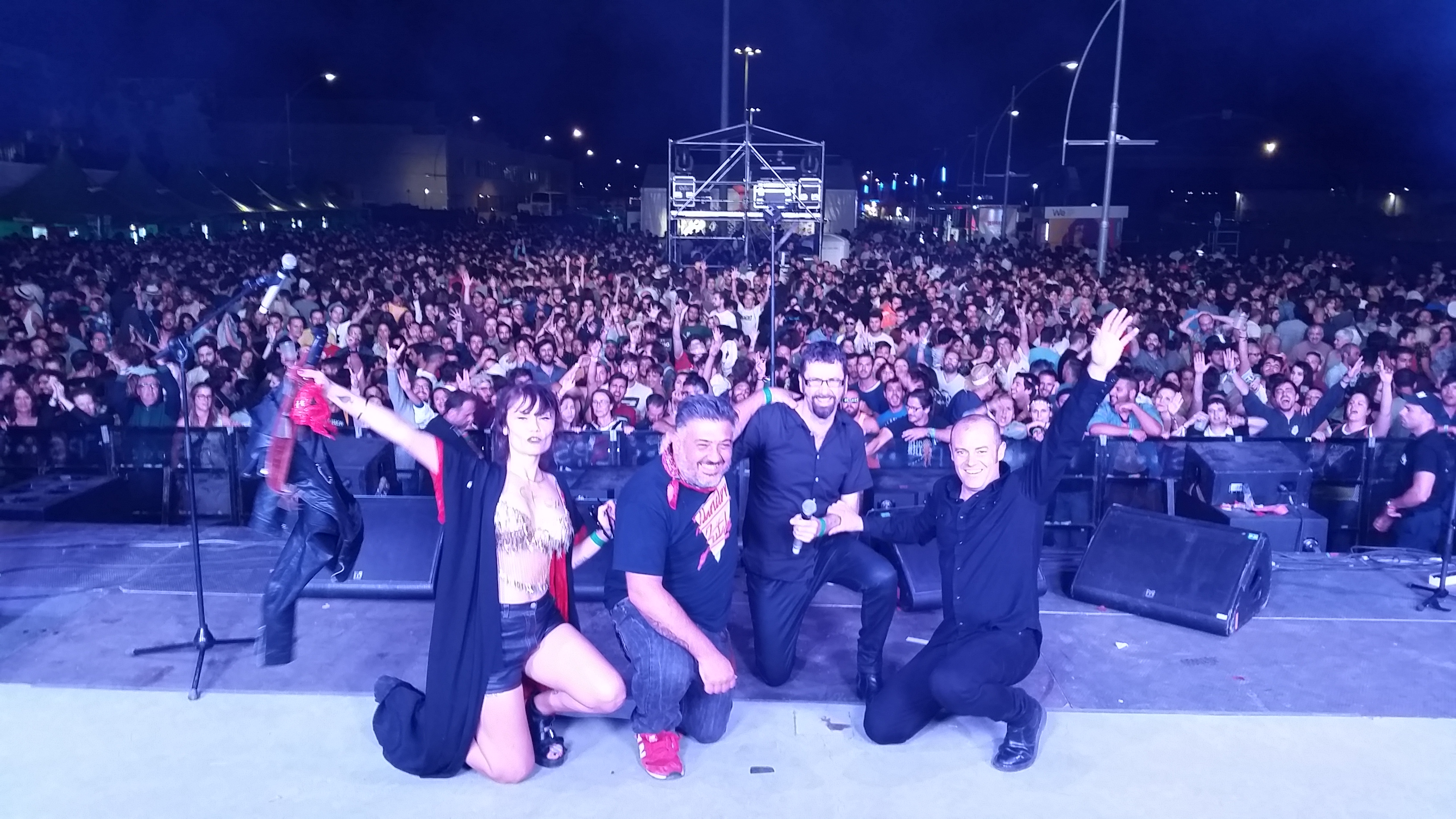 Concierto de Cycle durante el Festival Sonorama 2016, en Aranda de Duero (Burgos) España.